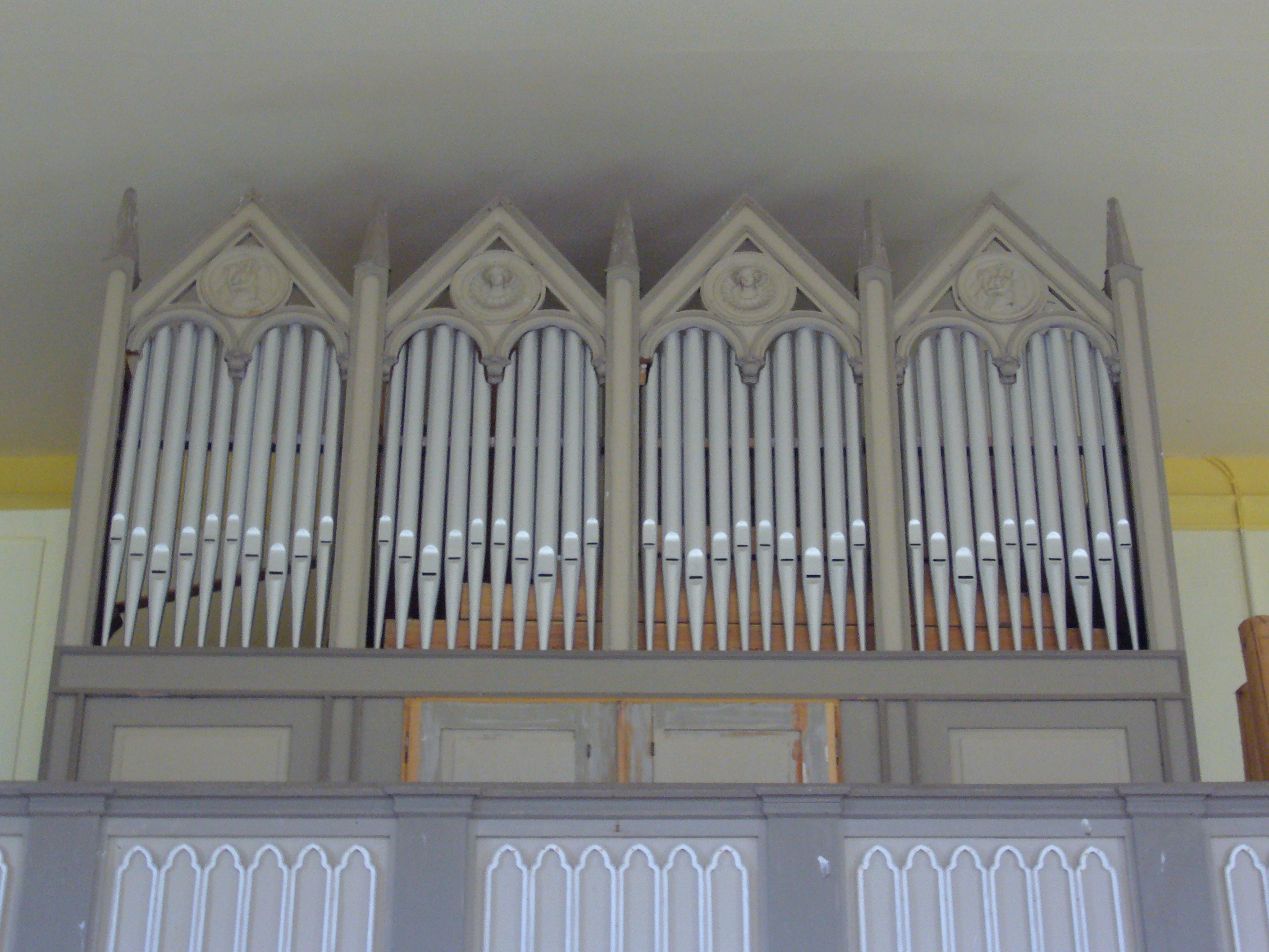 Die Orgel in der St.-Johannis-Kirche in Boek/ Rechlin (Mecklenburg-Vorpommern); erbaut 1853 von Wilhelm Sauer (1831-1916); wahrscheinlich die älteste erhaltene Sauer-Orgel